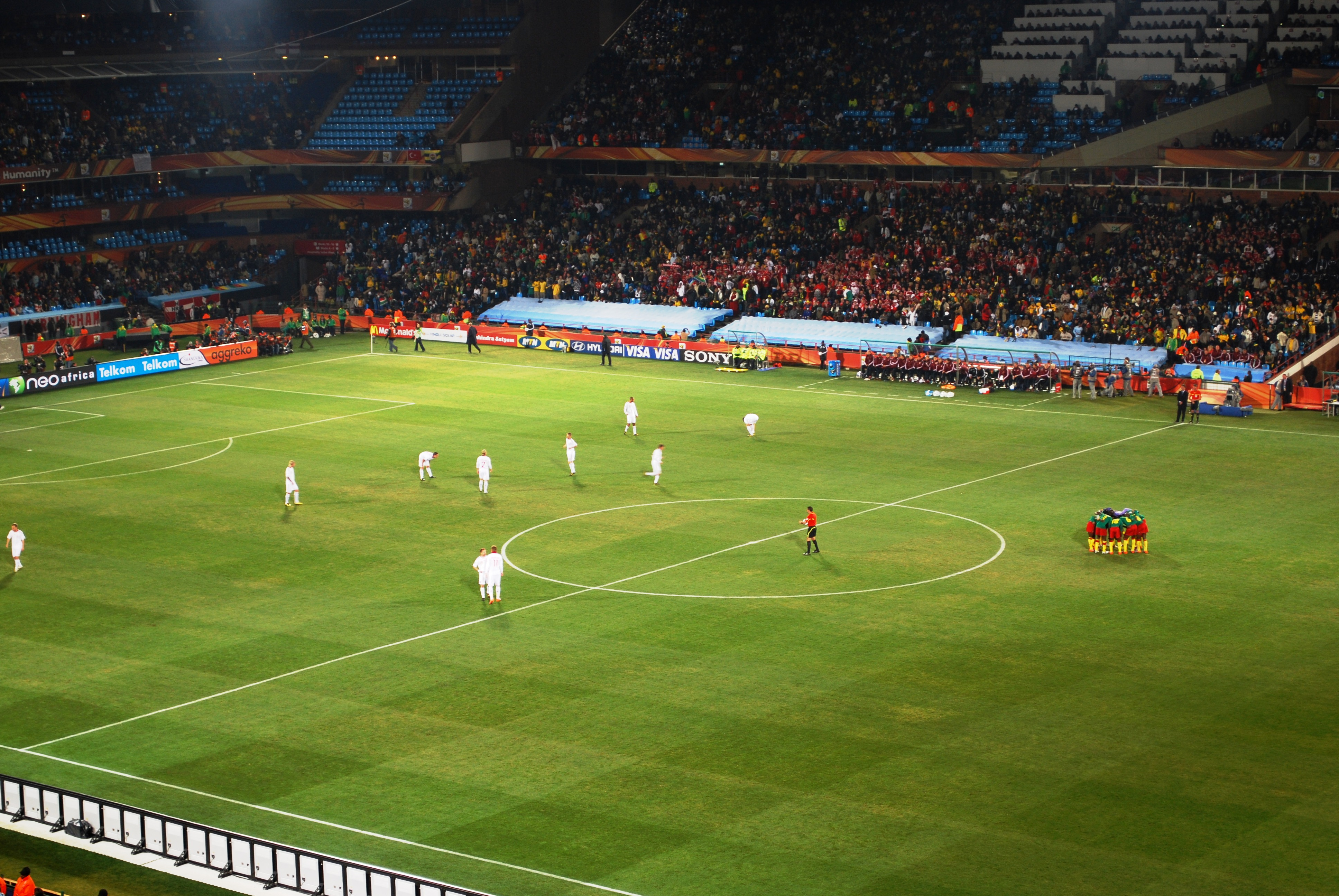 The Cameroonian and Danish soccer players prepare the kickoff of their World Cup match at Loftus Versfeld Stadium in Pretoria, South Africa, on June 19, 2010.